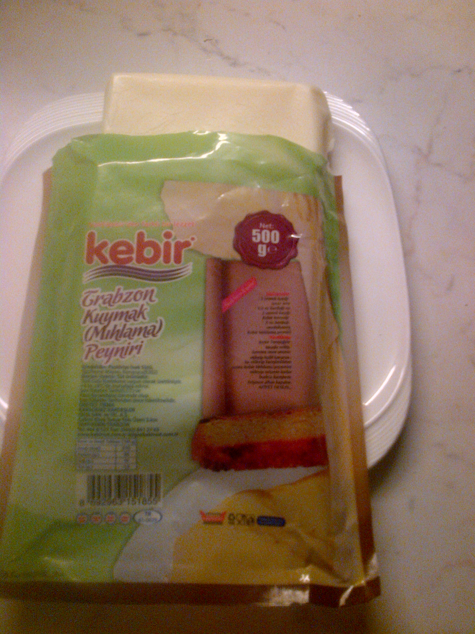 "Tel peynir" o "kuymak peyniri" se usa en la elaboracion del plato turco "kuymak" o "muhlama".